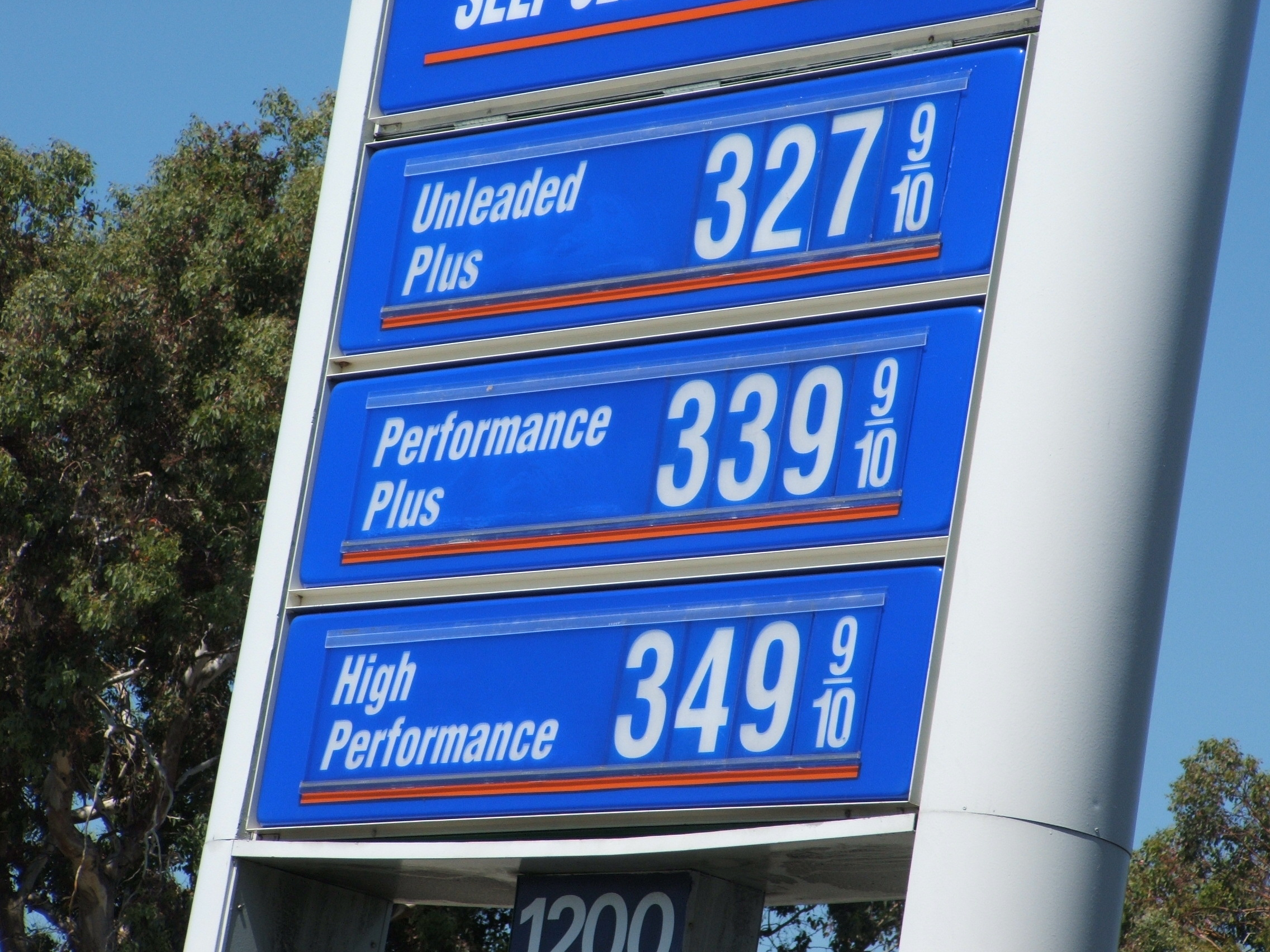 San Francisco, California